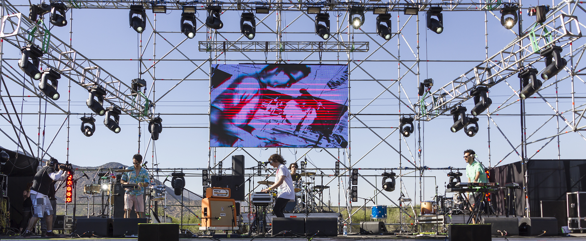 Astro en el Festival Primavera Fauna 2011.